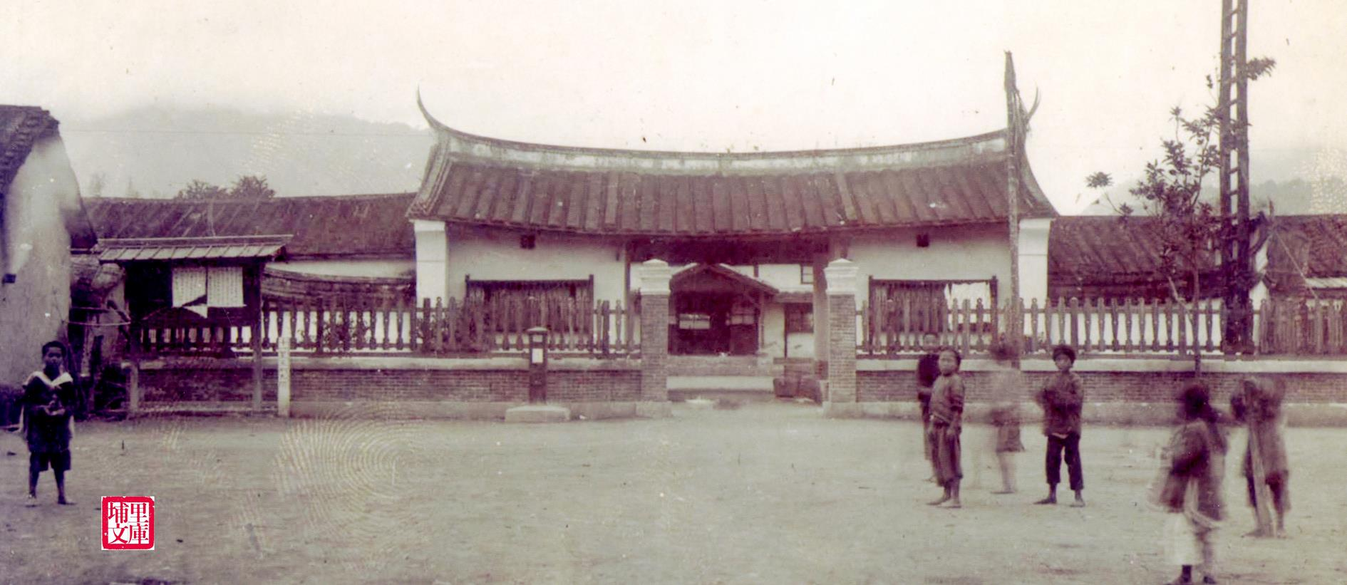 埔里社支廳署(今埔里舊圓環合作金庫址)，約攝於日明治42年(1909年)，李玉書醫師家族老照片 明治42年(1909)台北士林名醫李玉書，剛從醫學校畢業派至日本赤十字社台灣支部的擔任代理醫員，因投入理番救護之事業而曾短暫停留約一個月在埔里社，所以擁有這張「埔里社支廳」舍的舊影像，這時期的埔里社支廳舍建築樣式仍留存清代官衙建築(埔里撫民分府衙門)特有的燕尾屋脊，甚是珍貴。其庭前廣場上設有布告欄、郵筒等，並有好幾個埔里囝仔好奇的在此觀看。 日明治28年(西元1895年)11月，日軍進入大埔城後，接收清代大埔城內的官衙與軍營，其中埔里撫民分府衙門(今舊圓環合作金庫址)成為「台灣民政支部埔里社出張所」，是為埔里地區最高行政中樞所在。明治29年(1896年) 4月1日，全島行三縣一廳制，「台灣民政支部埔里社出張所」改制稱台中縣「埔里社支廳」。到了明治34年(1901年)11月，台灣再廢三縣改為20廳時期，改隸「南投廳埔里社支廳」。